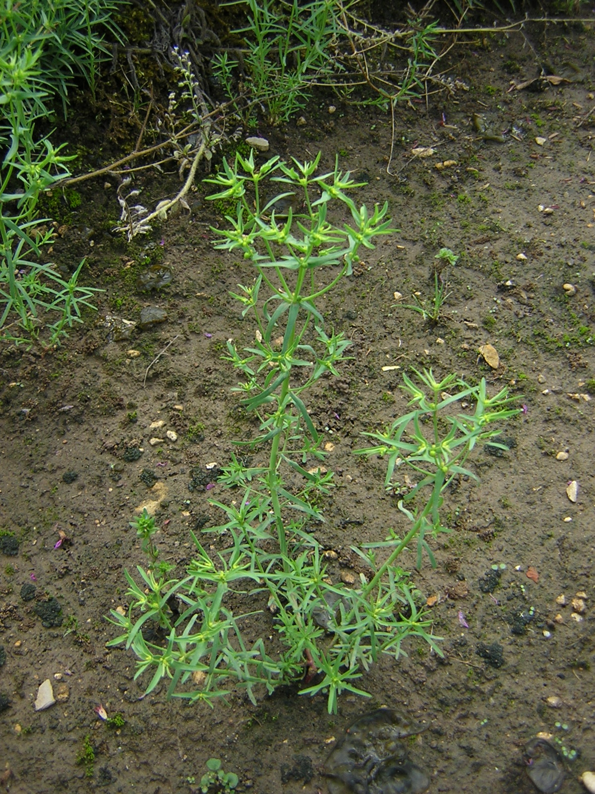 Euphorbia exigua, Joinville (Haute-Marne), France